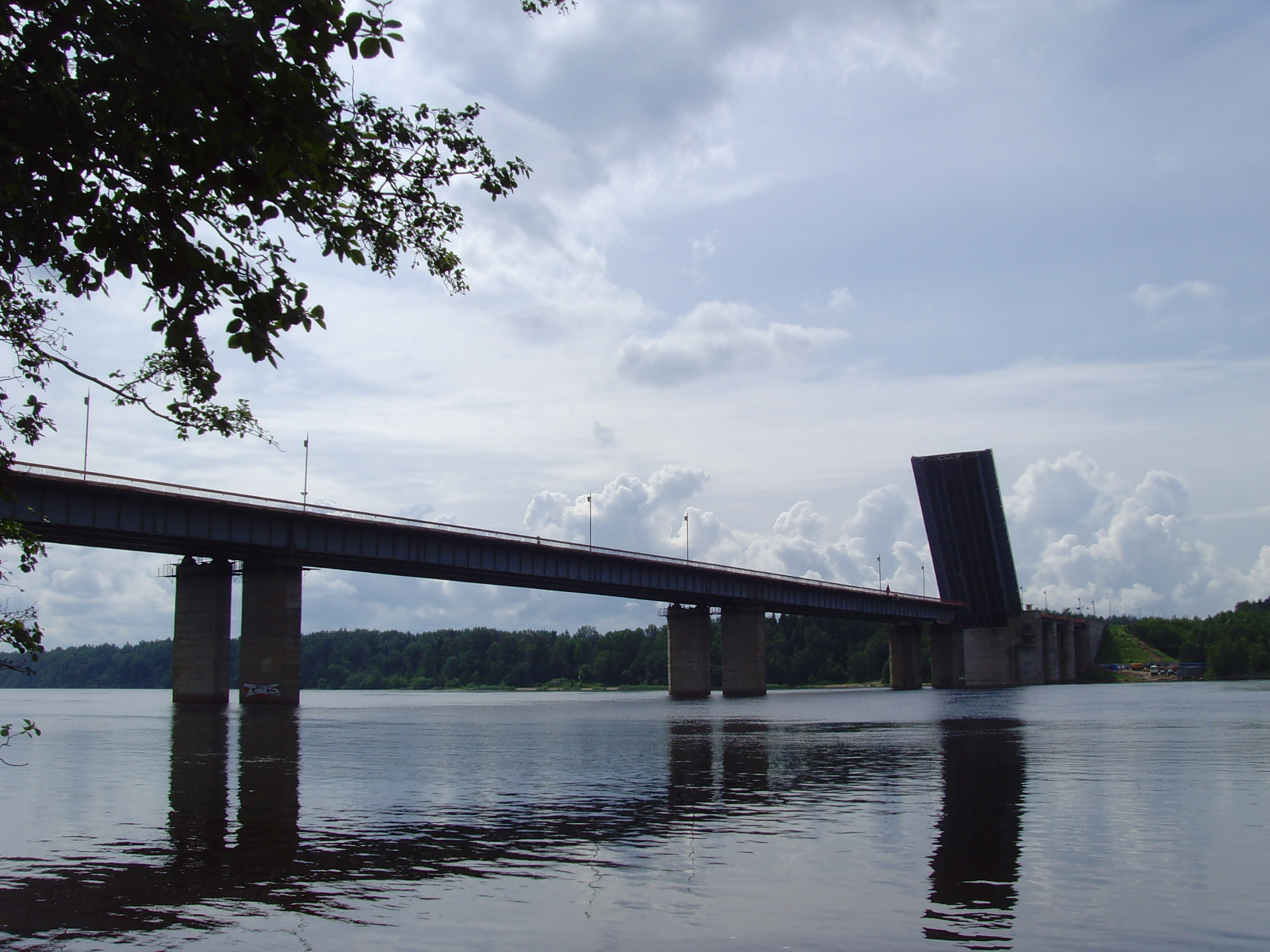 Мост через Неву